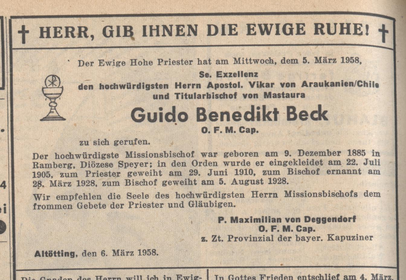 Bischof Guido Benedikt Beck, Apostolischer Vikar in Chile, Todesanzeige